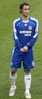 Ricardo Carvalho